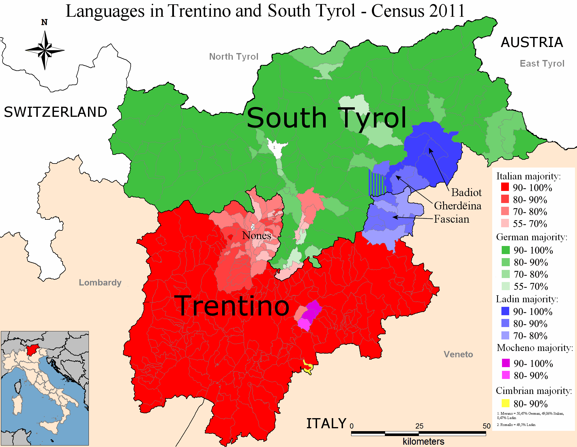 Censimento in Trentino ed Alto Adige, cfr. discussione qui